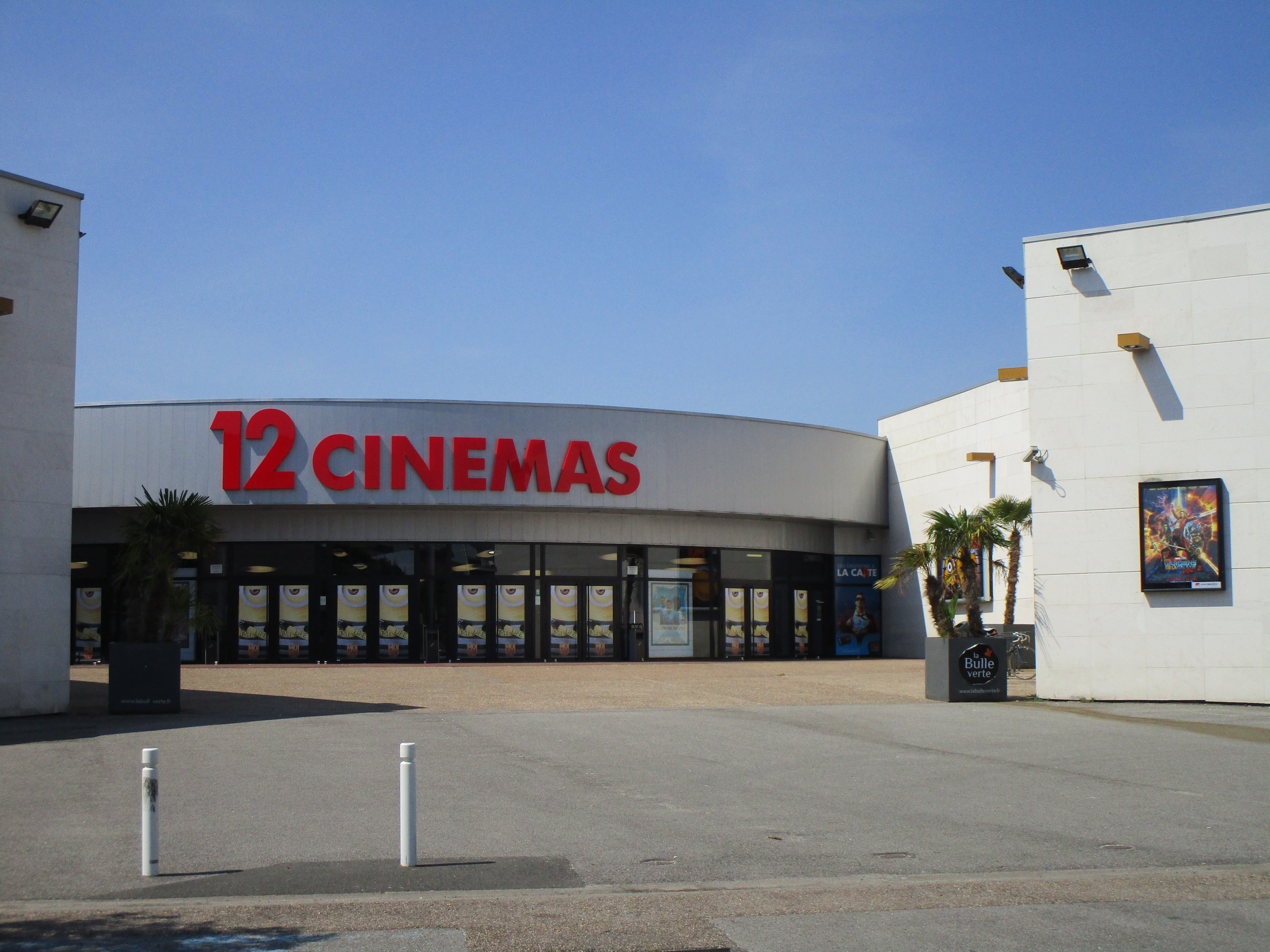 Le cinéma CGR du quartier des Deux-Lions, à Tours.